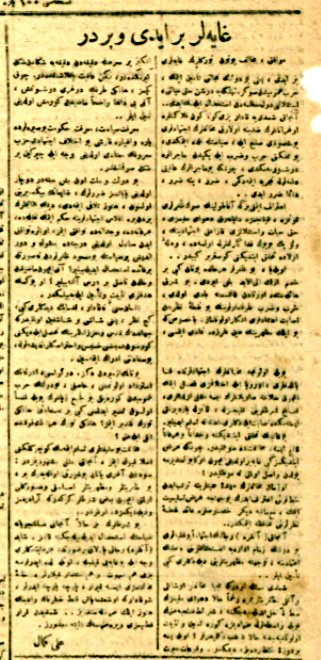 Ali Kemal'in Peyâm-ı Sabah gazetesindeki 10 Eylül 1922 tarihli son yazısı "Gayeler Bir İdi ve Birdir"